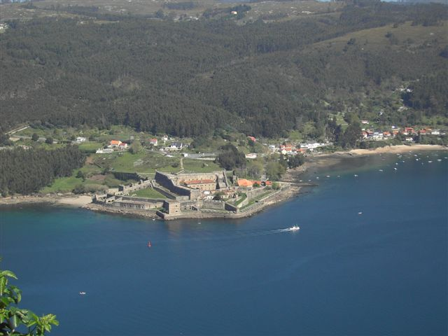 Castelo de San Felipe. Ría de Ferrol, Galicia, Spain.